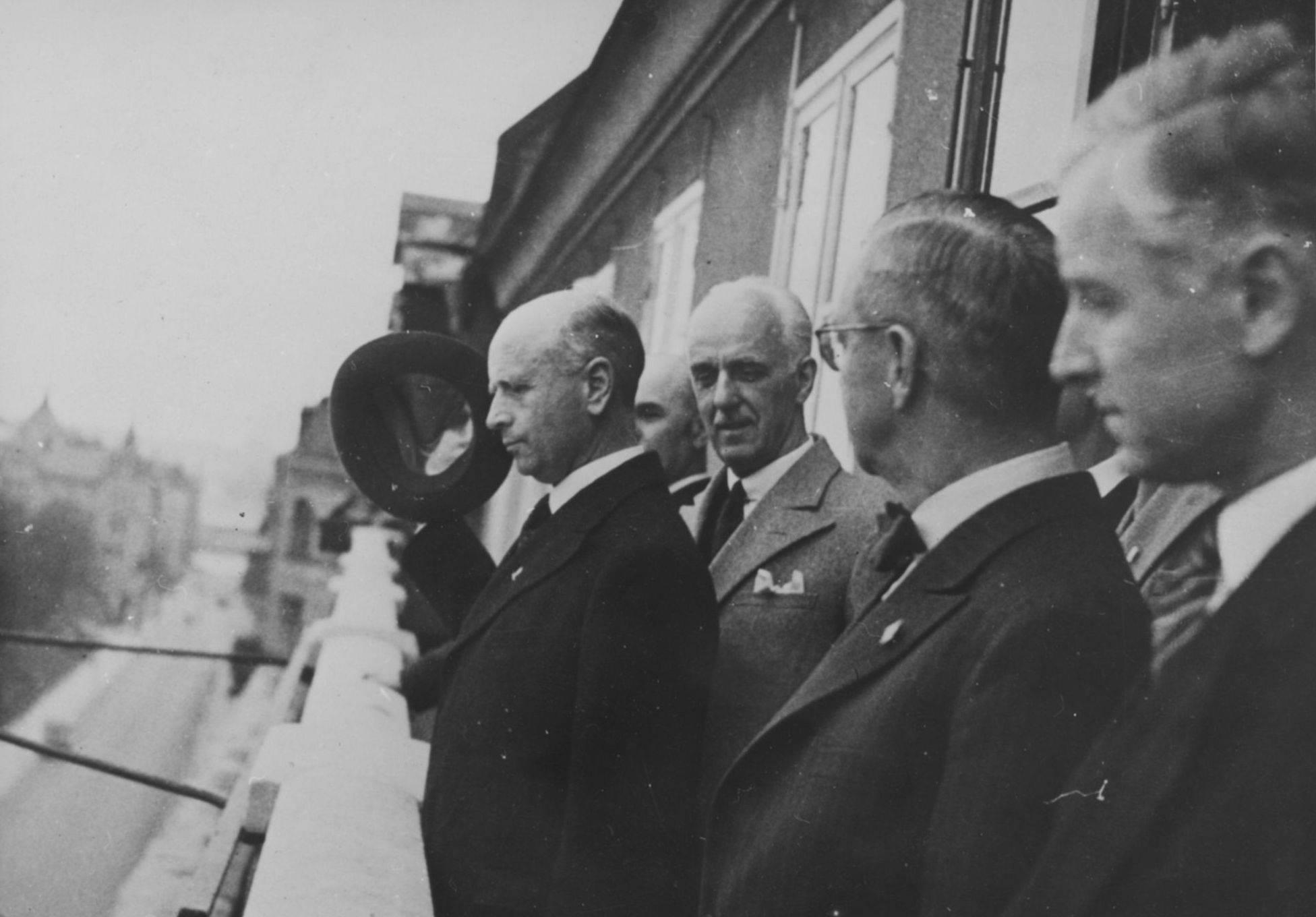 17. mai i Stockholm 1942.Nordmenn i Sverige feiret 17. mai under livlig deltagelse fra svensk side. I løpet av dagen ble det til en rekke spontane demonstrasjoner for Norge, blant annet utenfor den norske legasjon i Stockholm. Bildet viser minister Jens Bull på balkongen utenfor tar i mot svensk hyldning 17. mai utenfor legasjonen. RA/PA-1209/Uc/65/1-2/L644